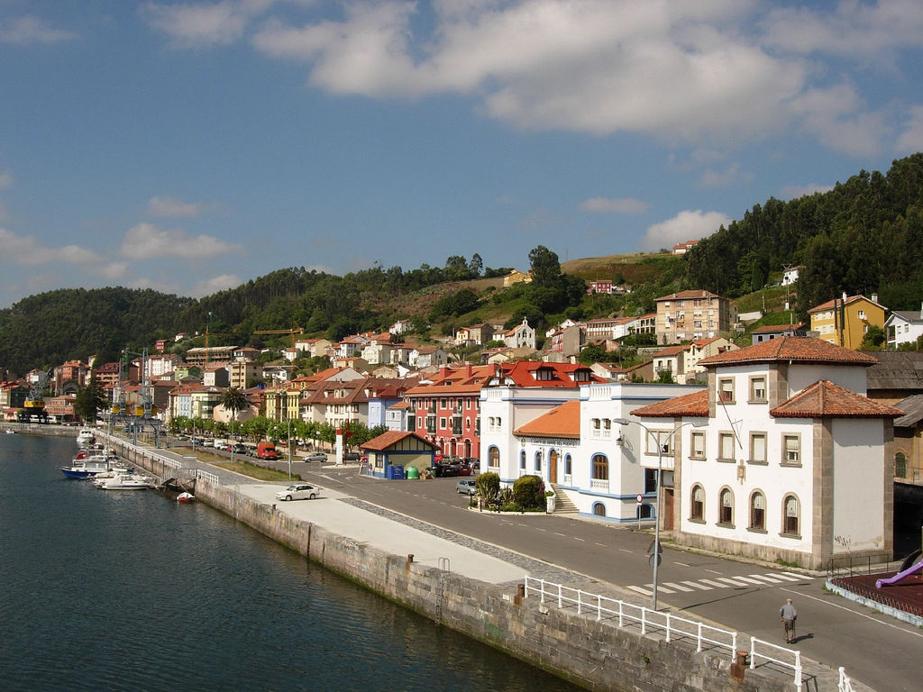 San Esteban de Pravia, Asturias